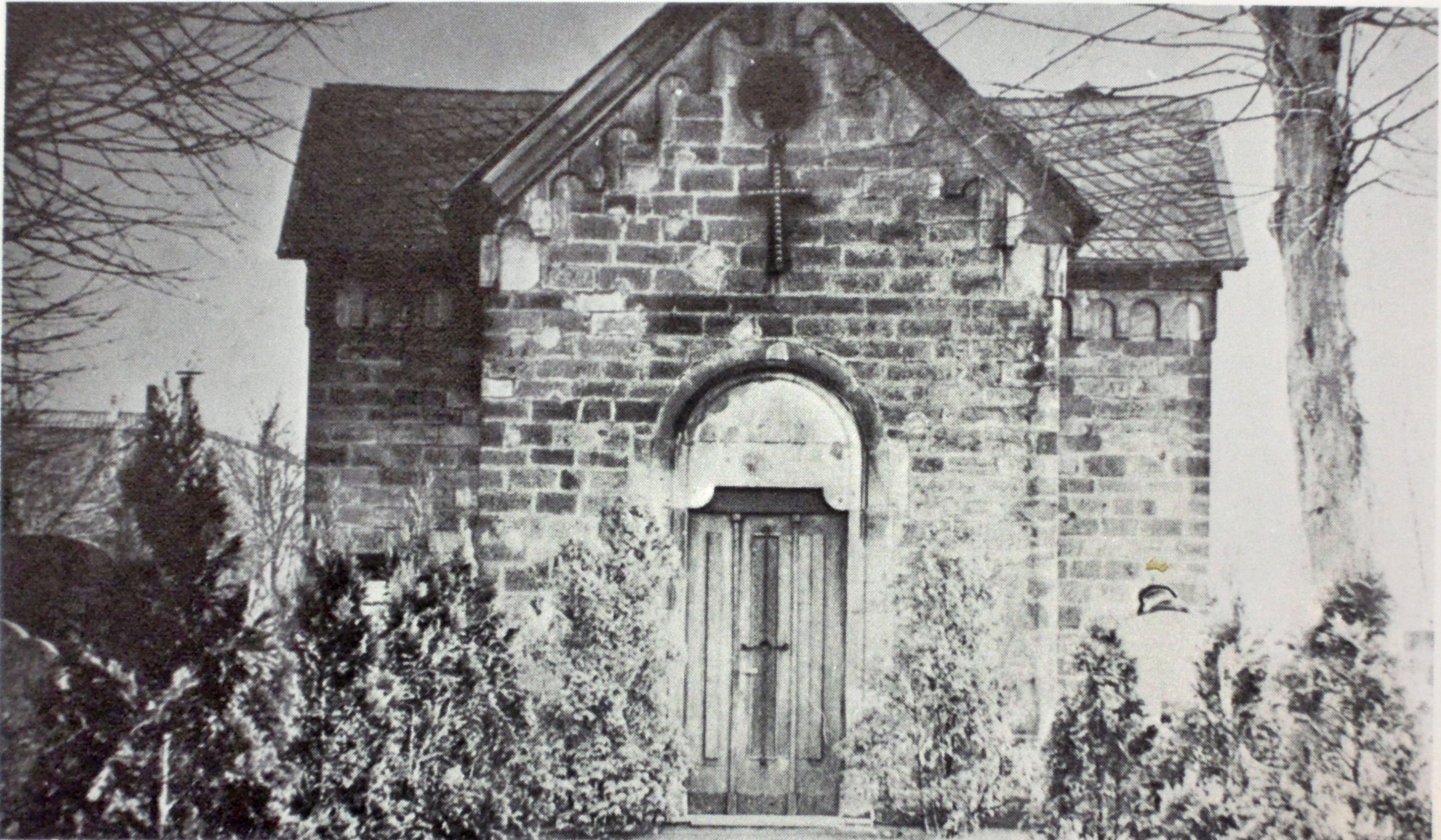 Die 1872 gebaute Friedhofskapelle des neuen Friedhofs